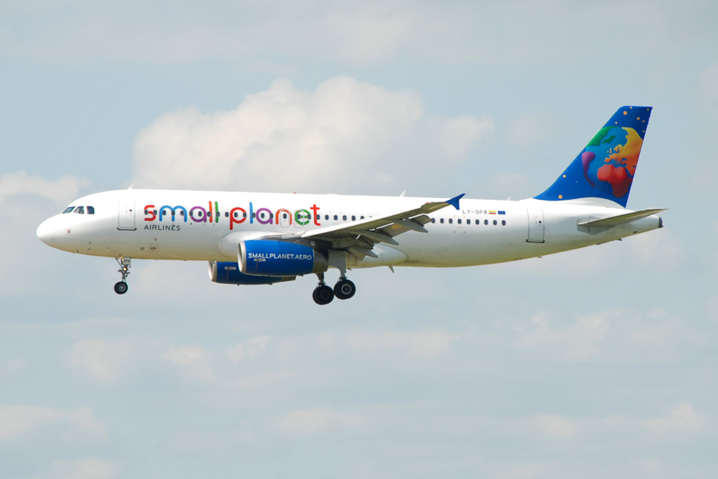 LY-SPA@LGW 05JUN14